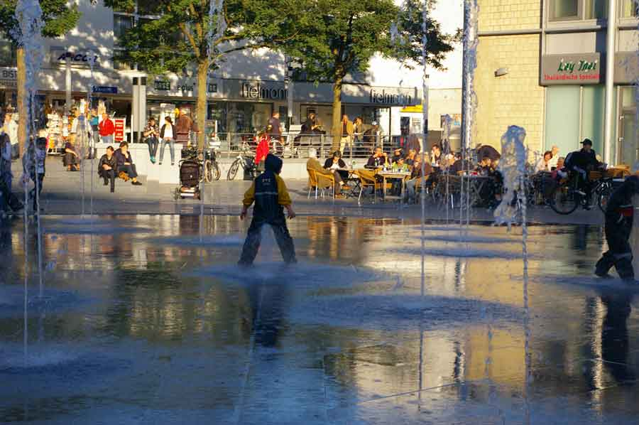 Marktbrunnen Langenfeld